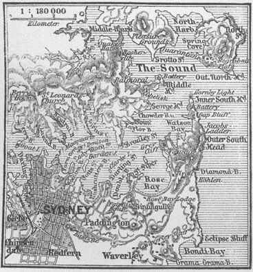 Karte Sydney MKL1888